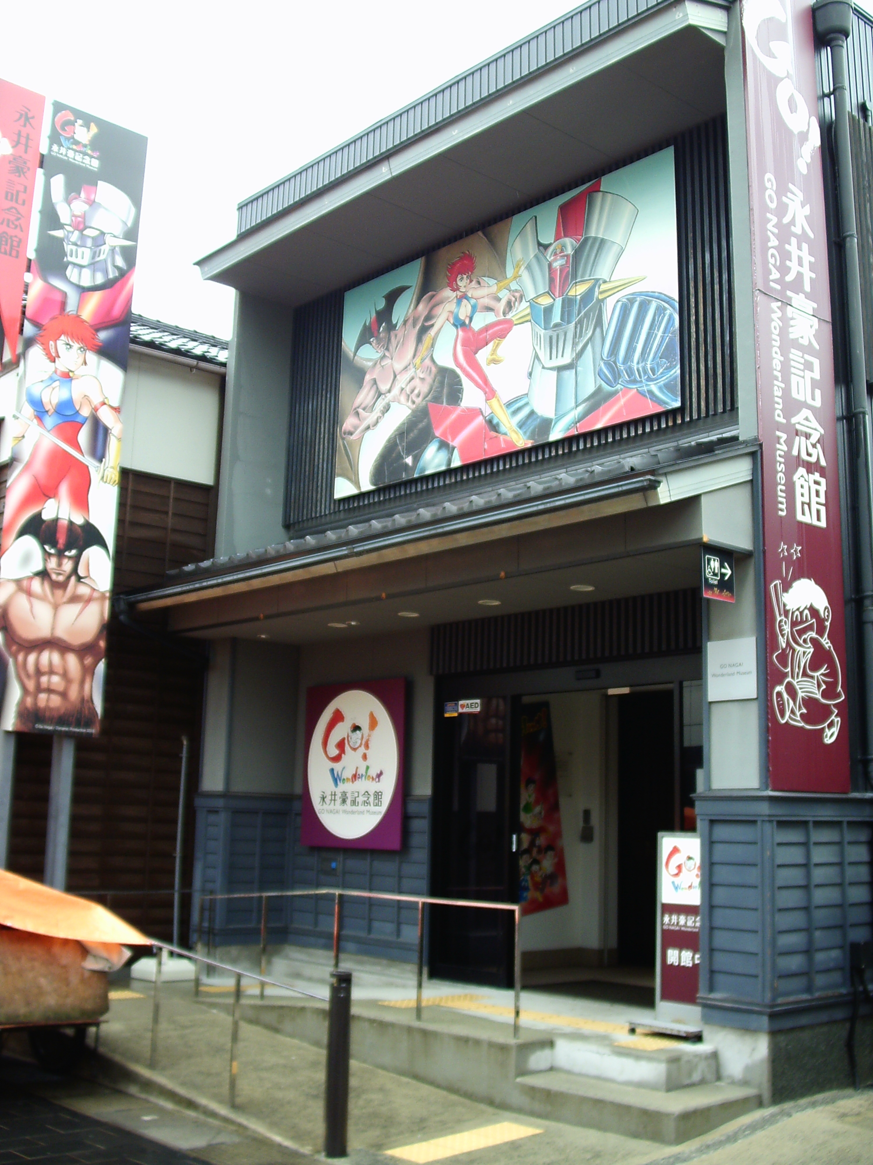 輪島市出身の漫画家・永井豪を記念して建てられた 朝市通りに面している